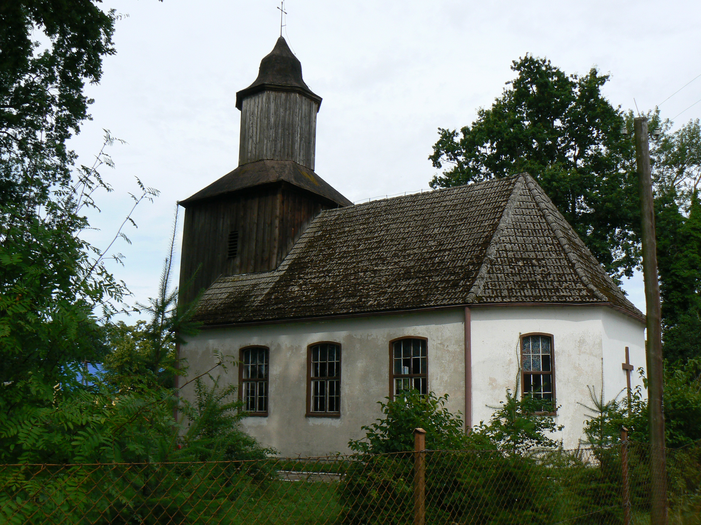 Słowieńsko - dawny kościół ewangelicki, ob. rzymskokatolicki filialny p.w. św. Michała Archanioła, 1739